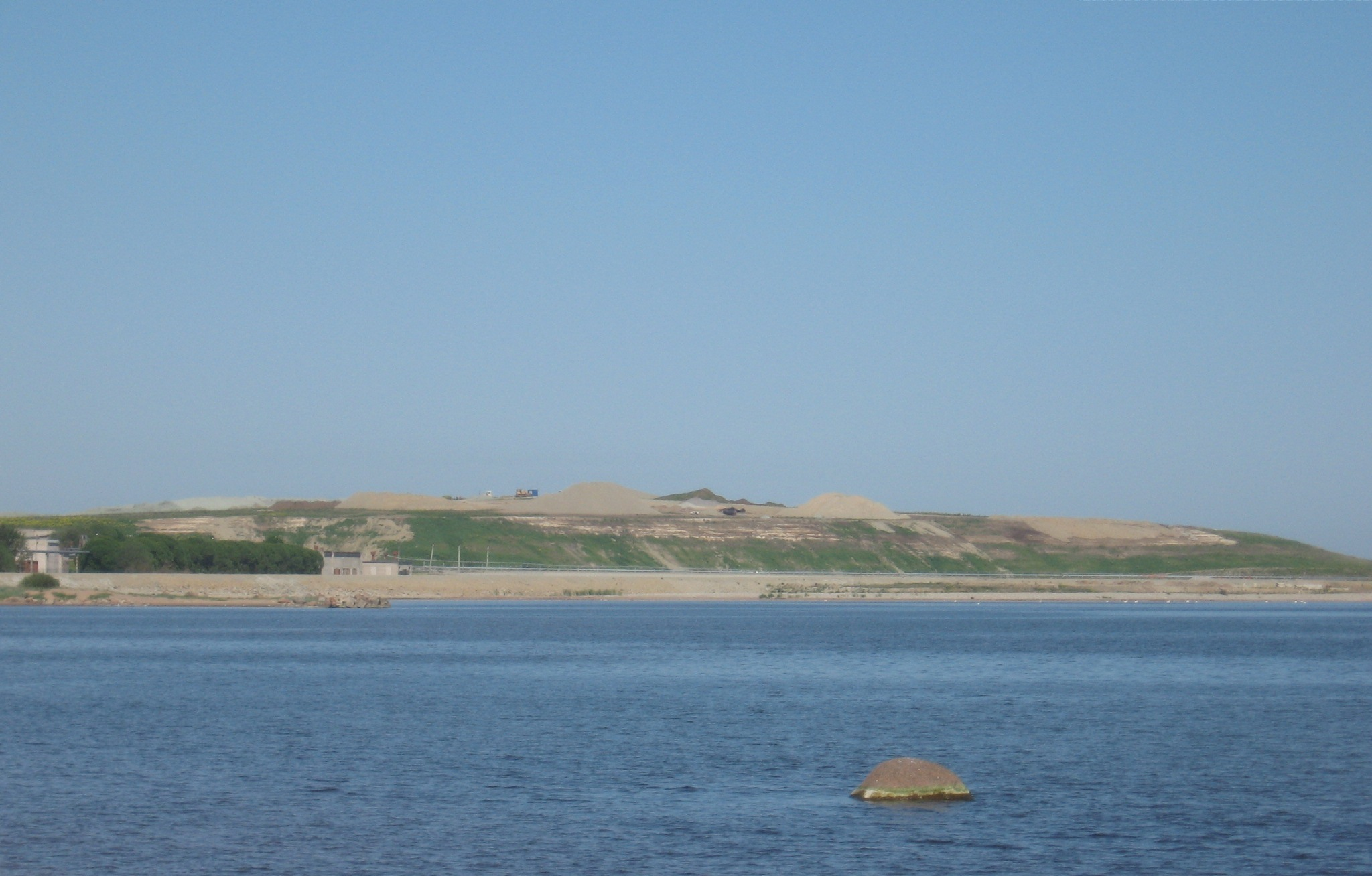 Sillamäe jaatmehoidla.